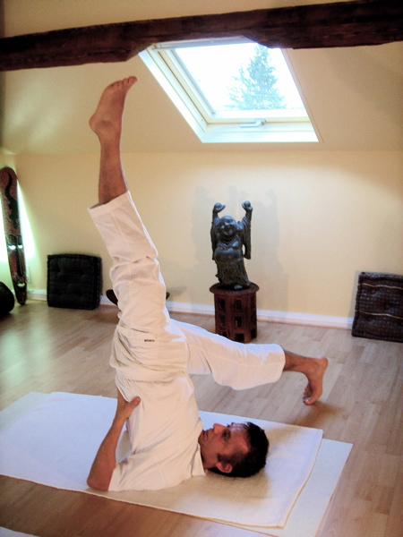 Yoga postures ekapa-sarvangasana